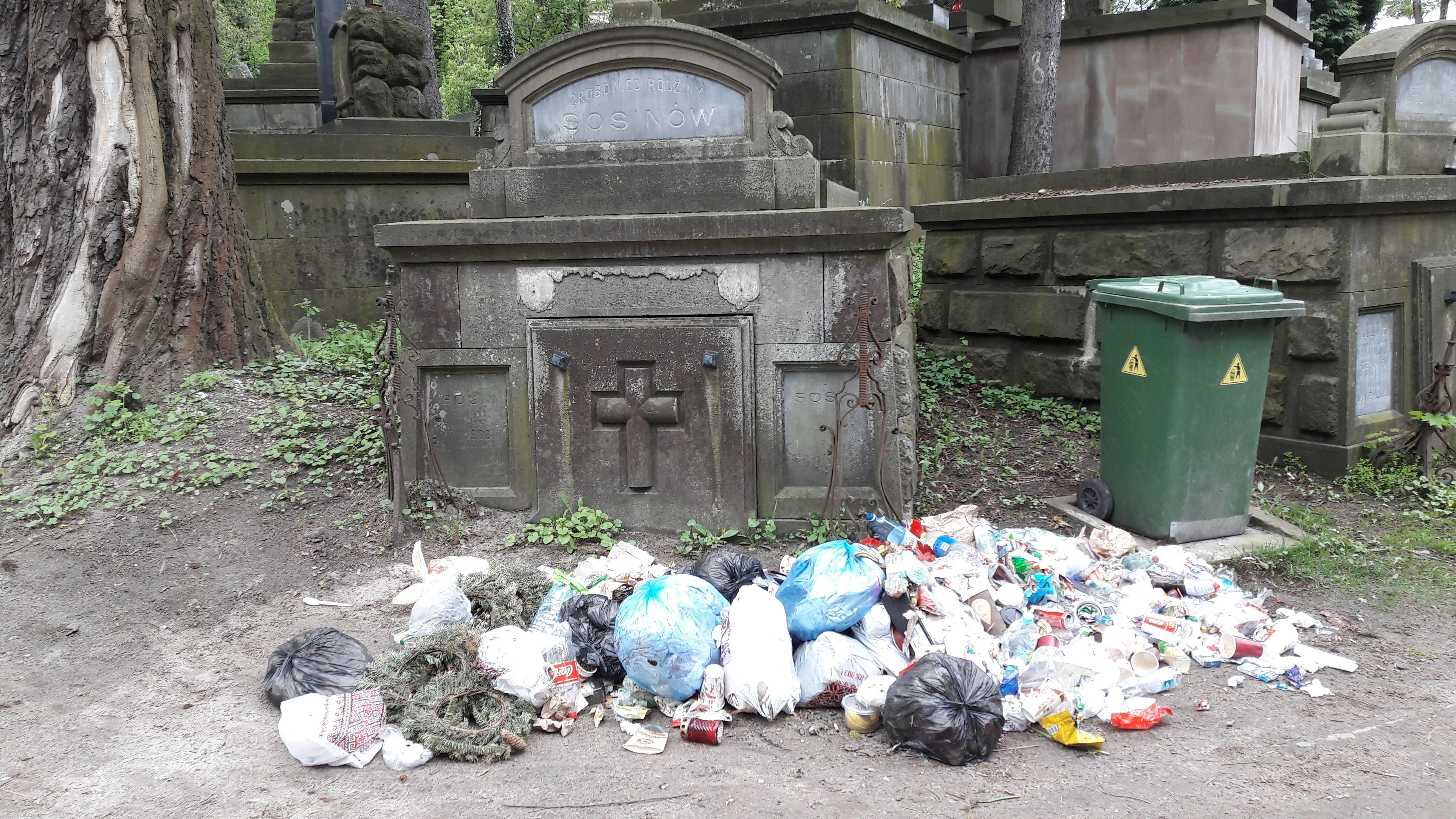 Мусор, не поместившийся в бак на Лычаковском кладбище, Львов, 1 мая 2017